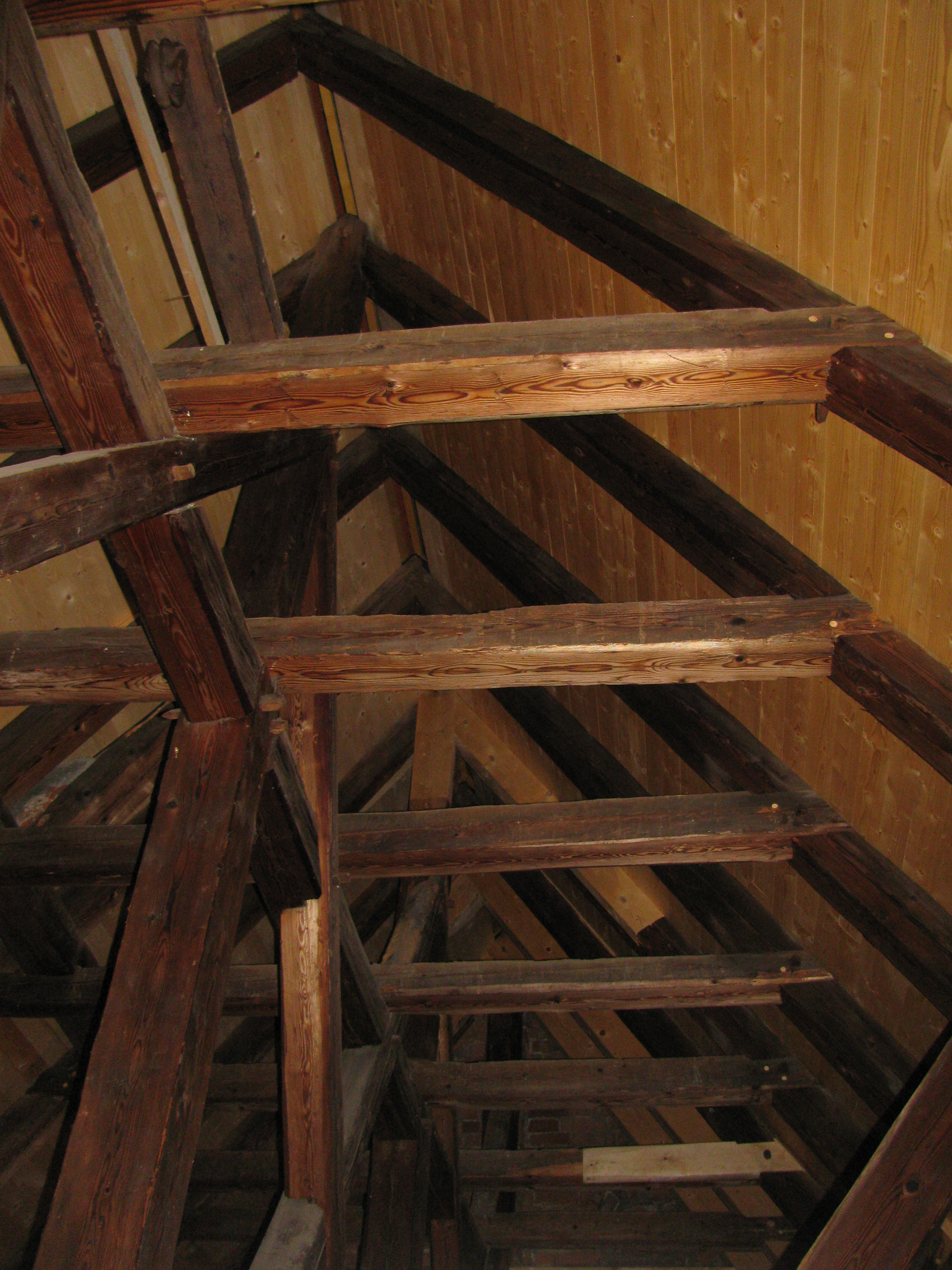 Leubnitzer Kirche, Dachstuhl